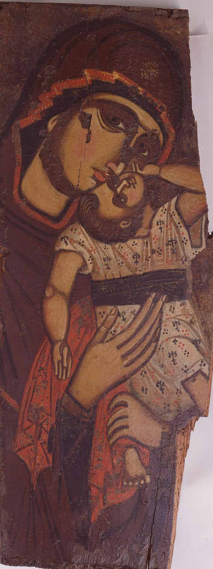 Παναγία Γλυκοφιλούσα (Πελαγονίτισσα) – β΄ μισό 14ου αιώνα - Βυζαντινό Μουσείο Βέροιας